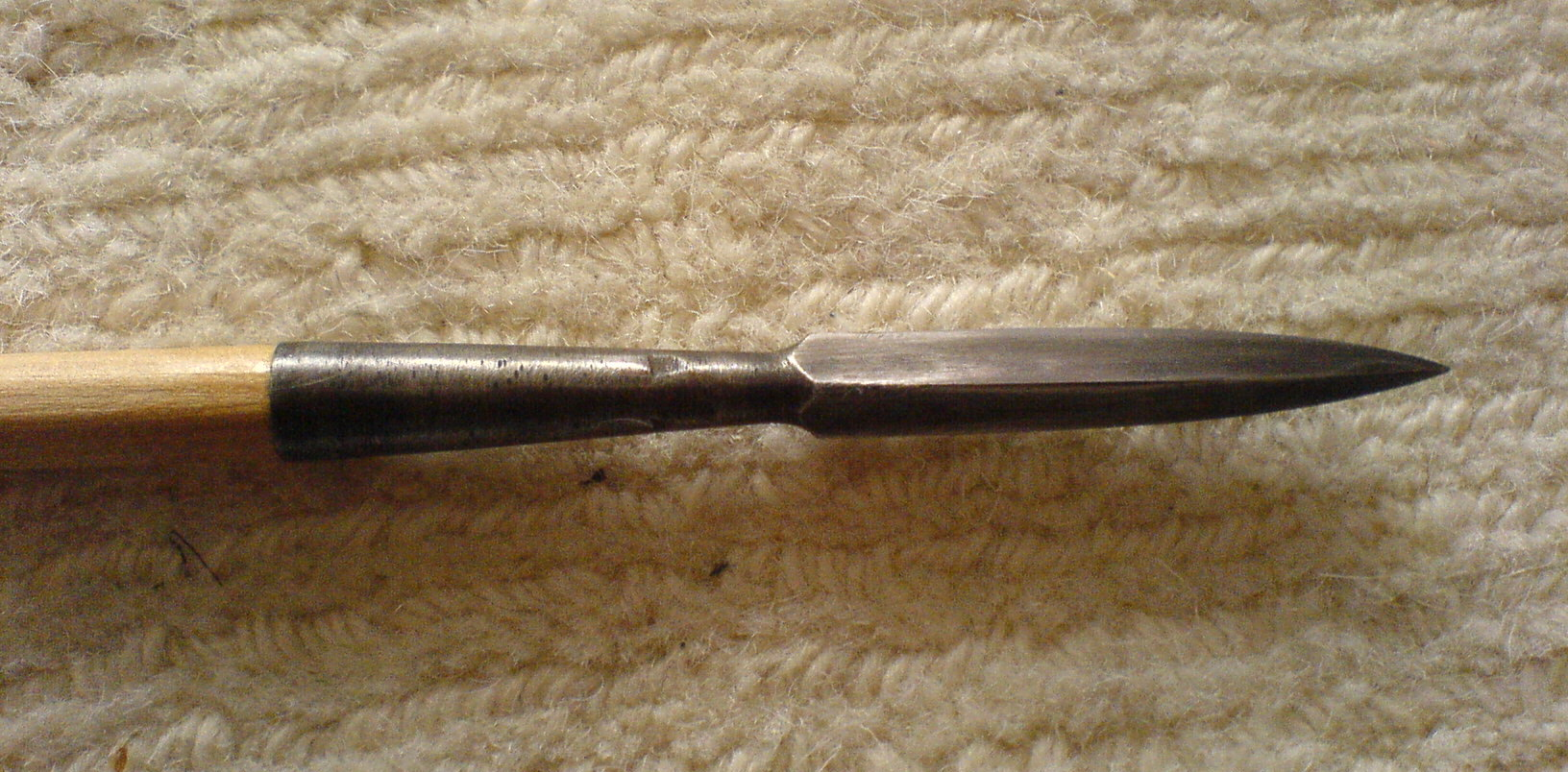 Needlebodkin auf einem Zedernschaft